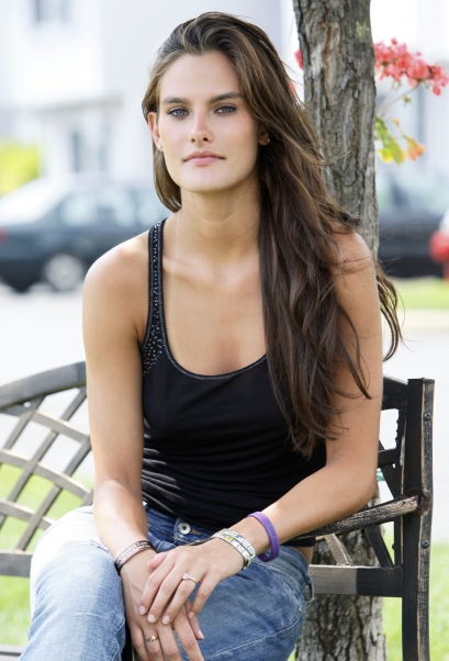 Melissa Baker, American supermodel